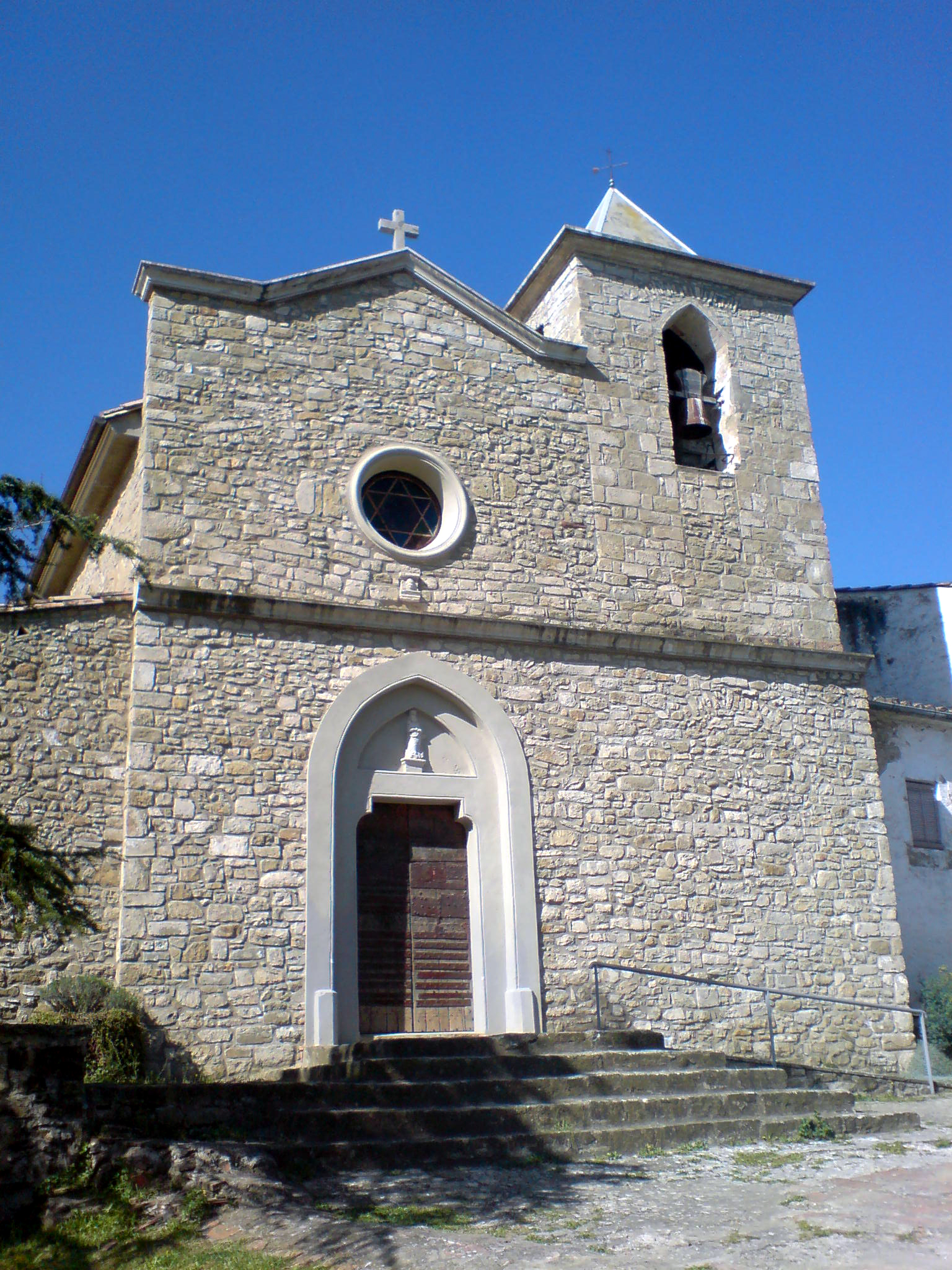 Església de Santa Maria de Camós. 25 de març de 2009